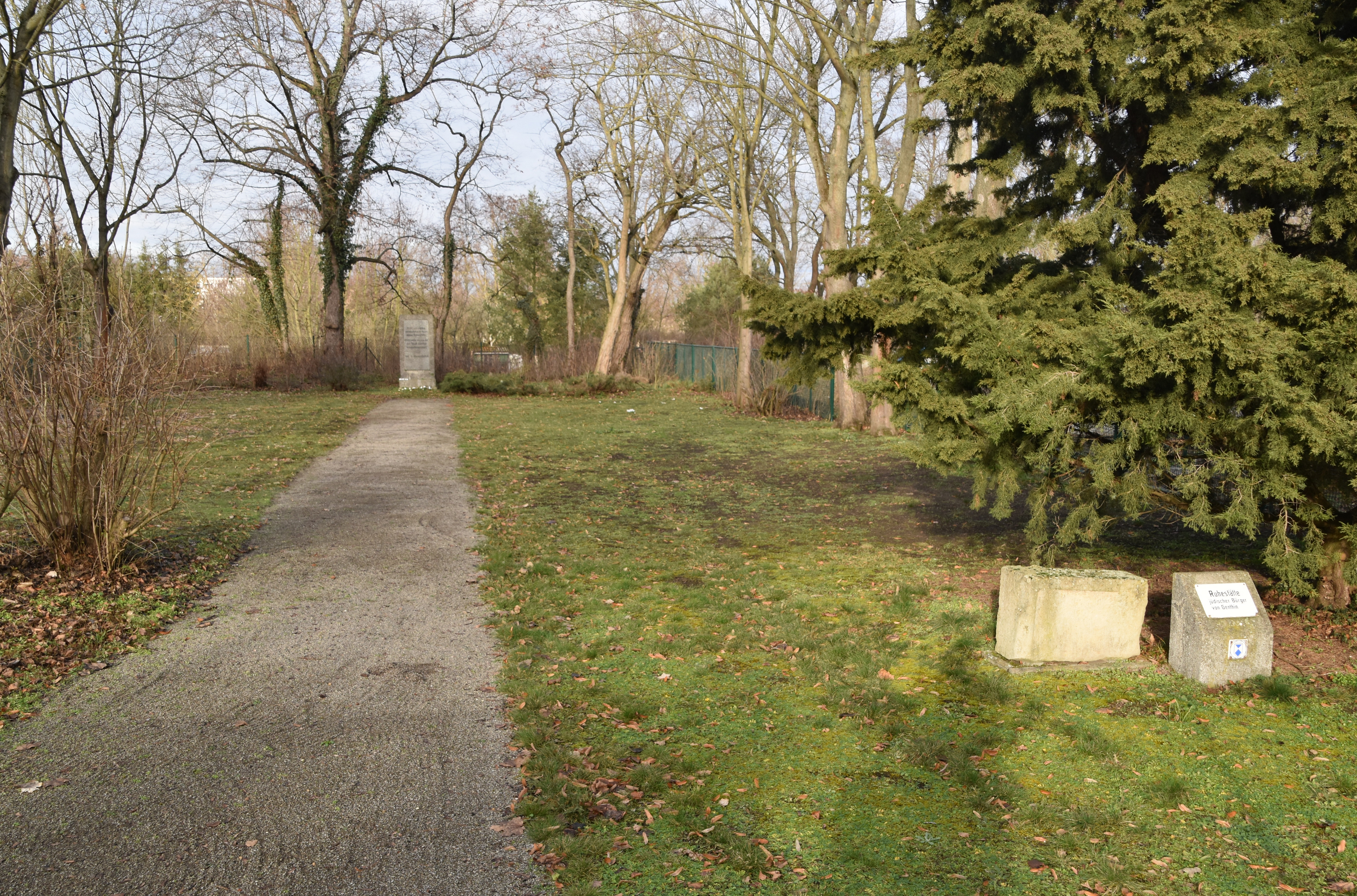 Jüdischer Friedhof Genthin